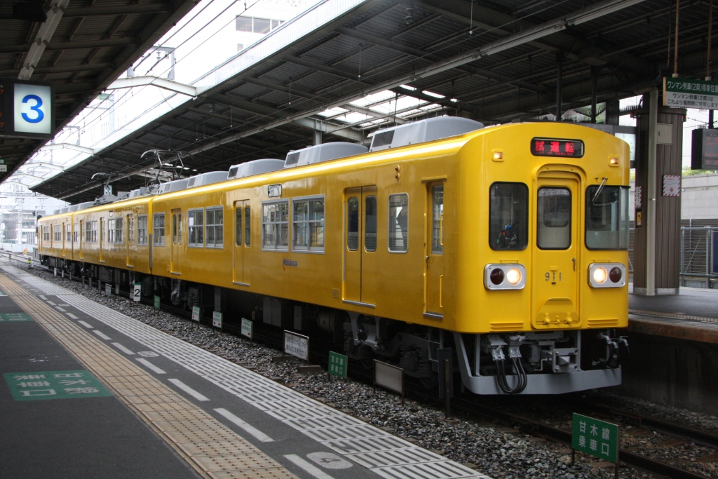 西鉄911-912-913編成 石鉄久留米駅で撮影